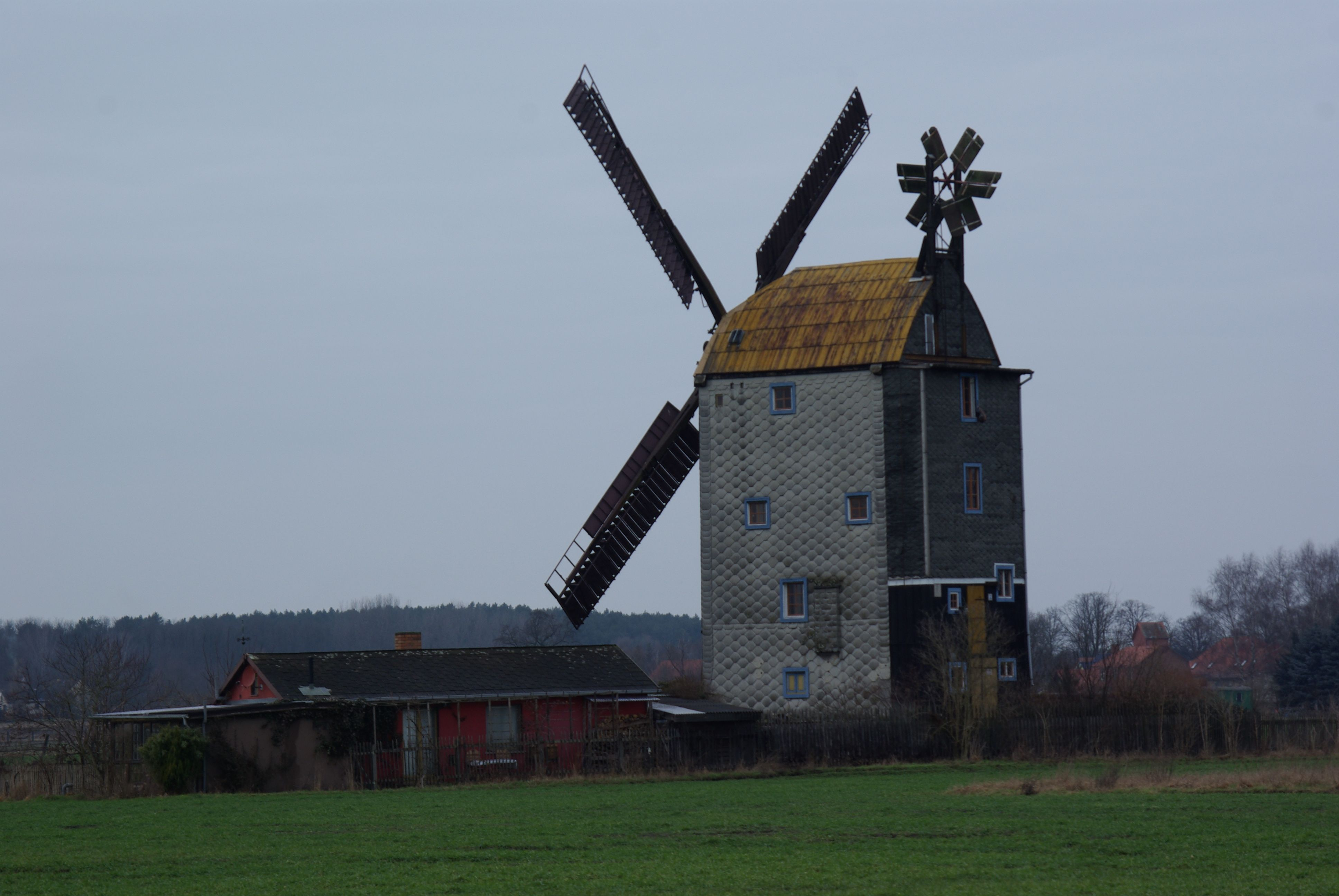 Am Mellensee Ortsteil Saalow in Brandenburg. Die Paltrockwindmühle im Ortsteil Saalow. Die Windmühle steht unter Denkmalschutz (geotags in den exif-Daten).